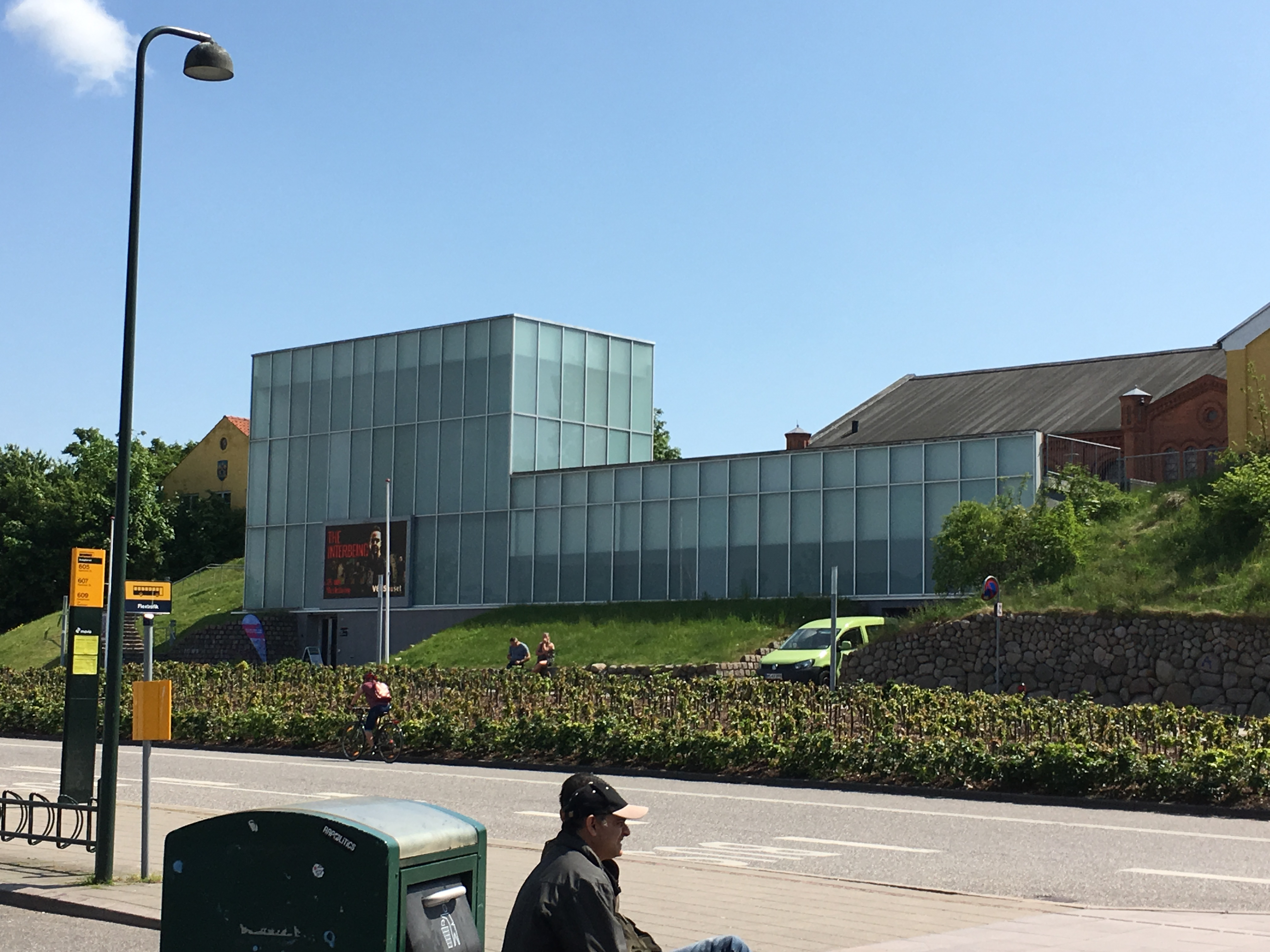 Næstved Teater set fra Kvægtorvet